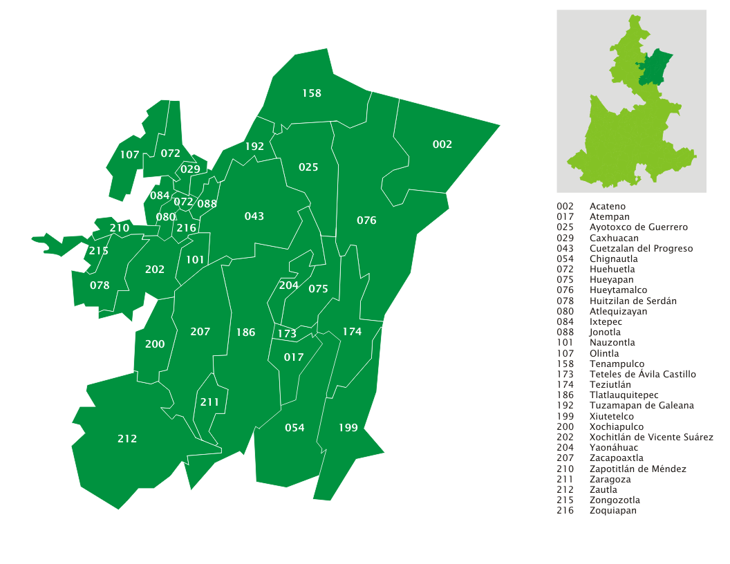 Mapa de la Región II de Teziutlán, estado de Puebla, México